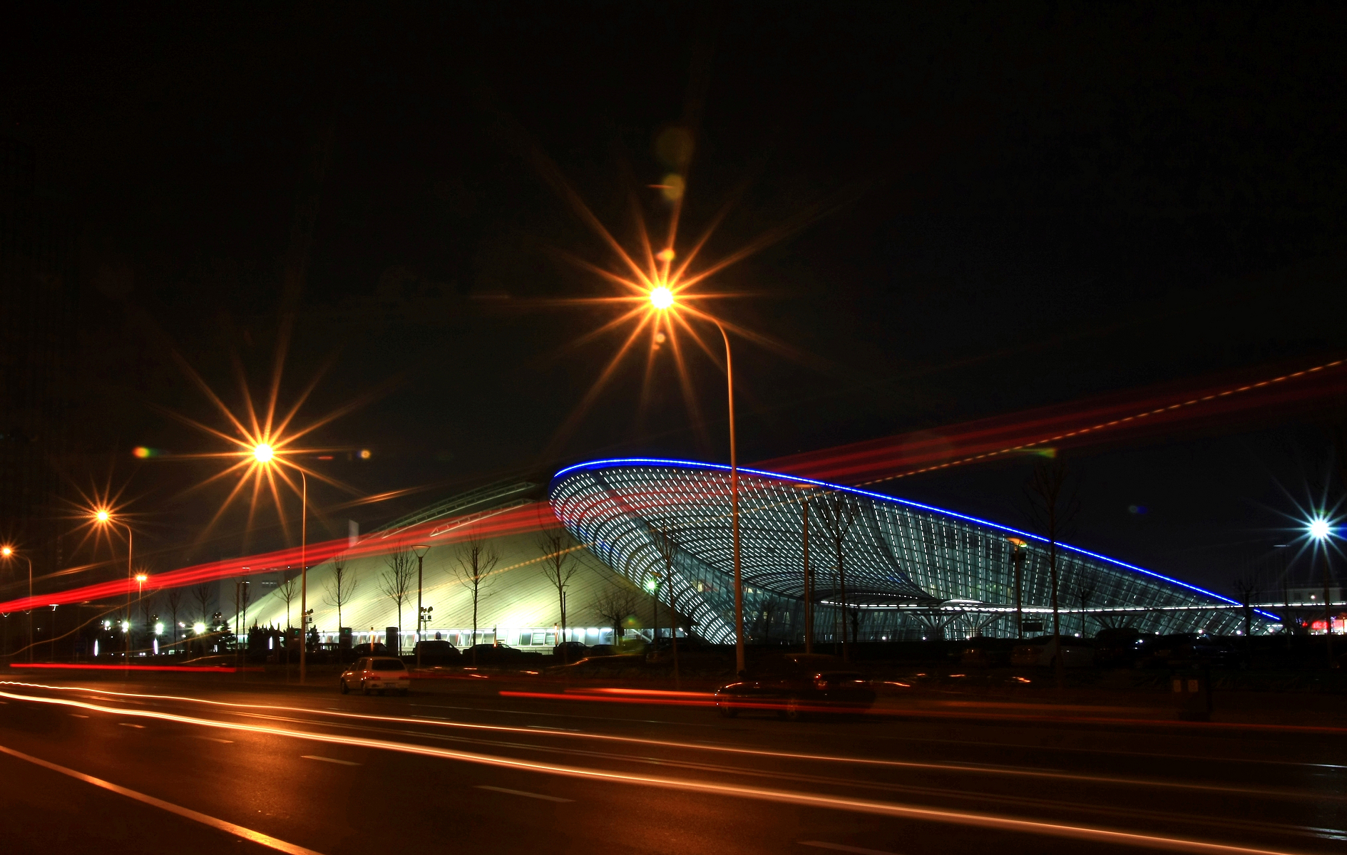 Tianjin Museum